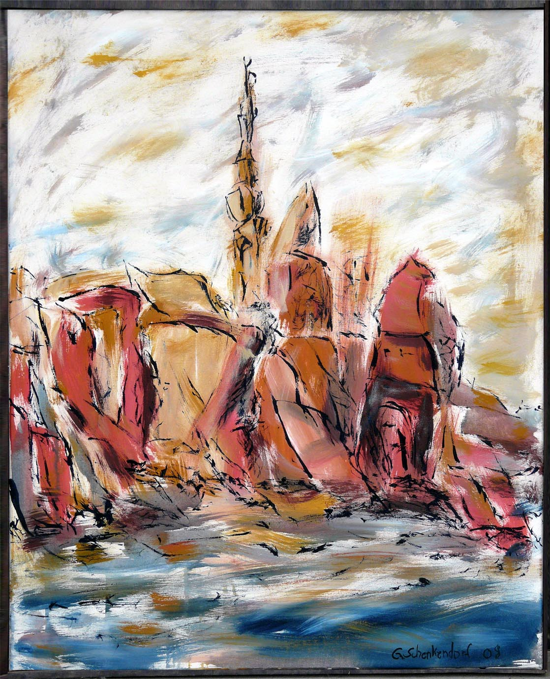 Blick vom Hafen auf Tangermünde Gemälde von Guido Schenkendorf (Acryl)